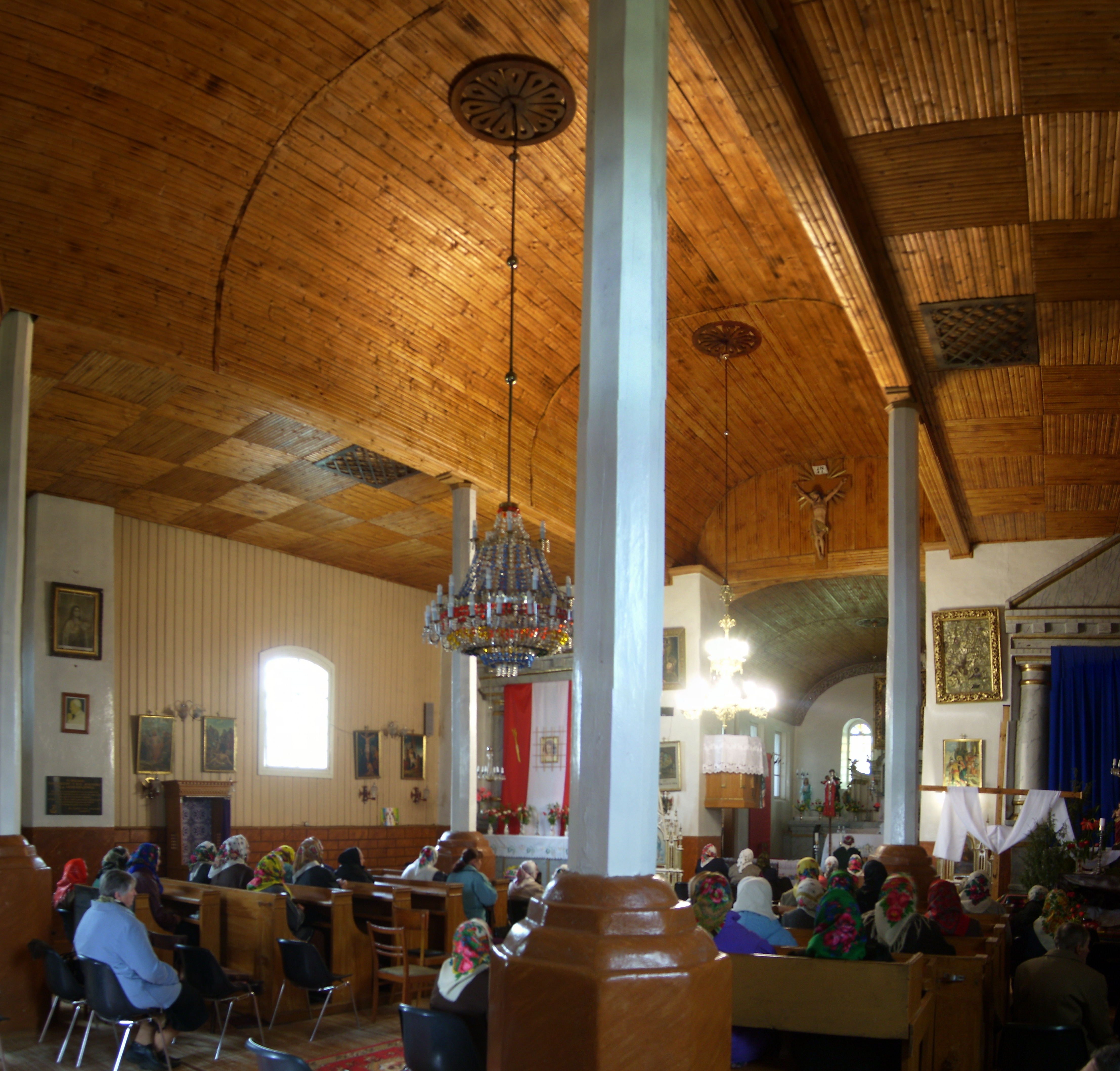 Беларуская (тарашкевіца): Касьцёл Сьв. Міхаіла. в. Няцеч This is a photo of Belarusian heritage monument. Reference number: 413Г000361 ( WLM)